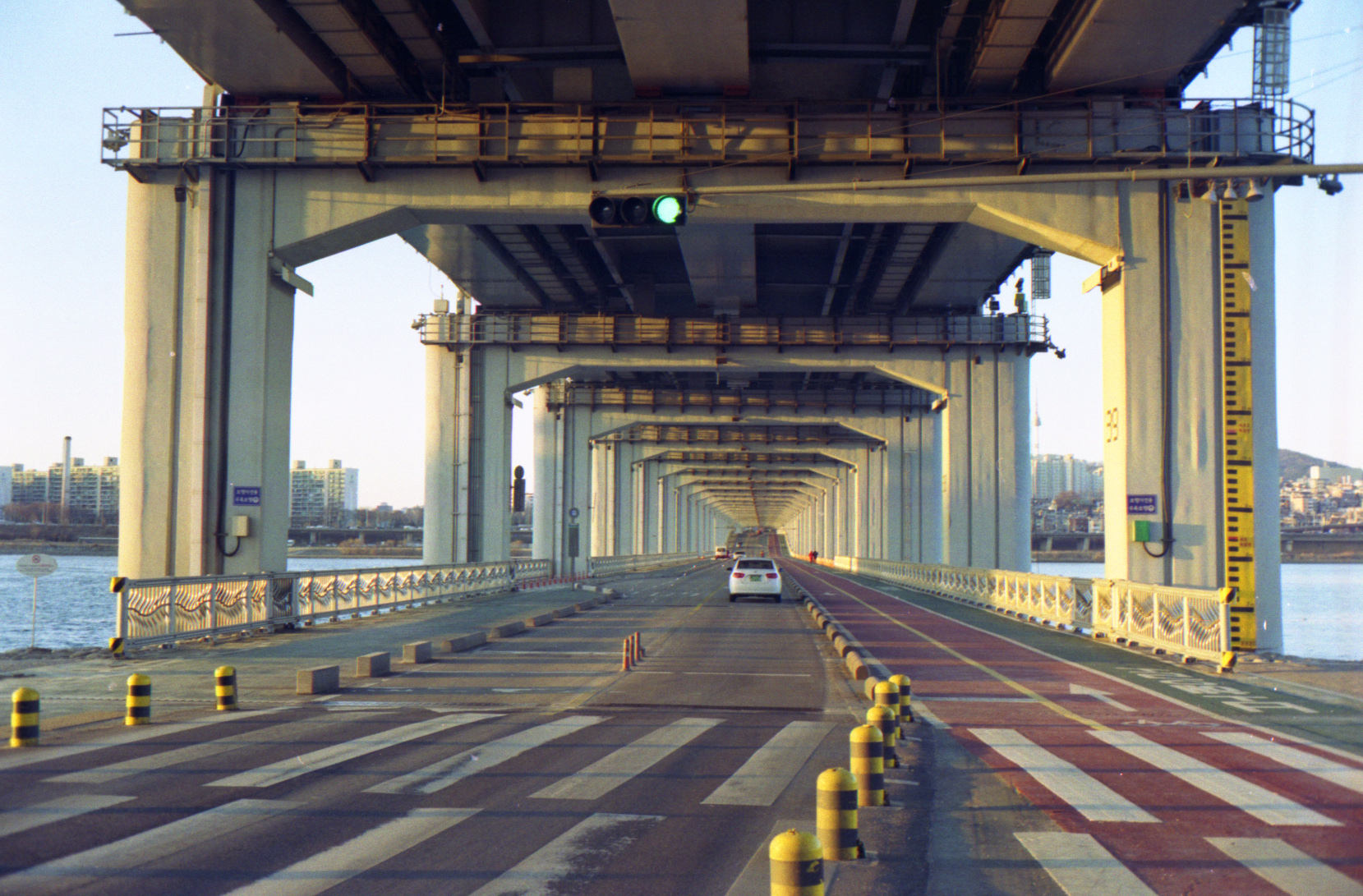 Saturation을 좀 빼고 스캔했다. ... 아뭏든 여기까지가 Fuji C200 + Vivitar 35es